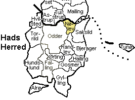 Kort der viser Nølev Sogn, Hads Herred, Århus Amt, Denmark.